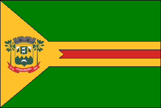 Bandeira de Afonso Bezerra, Rio Grande do Norte, Brasil.